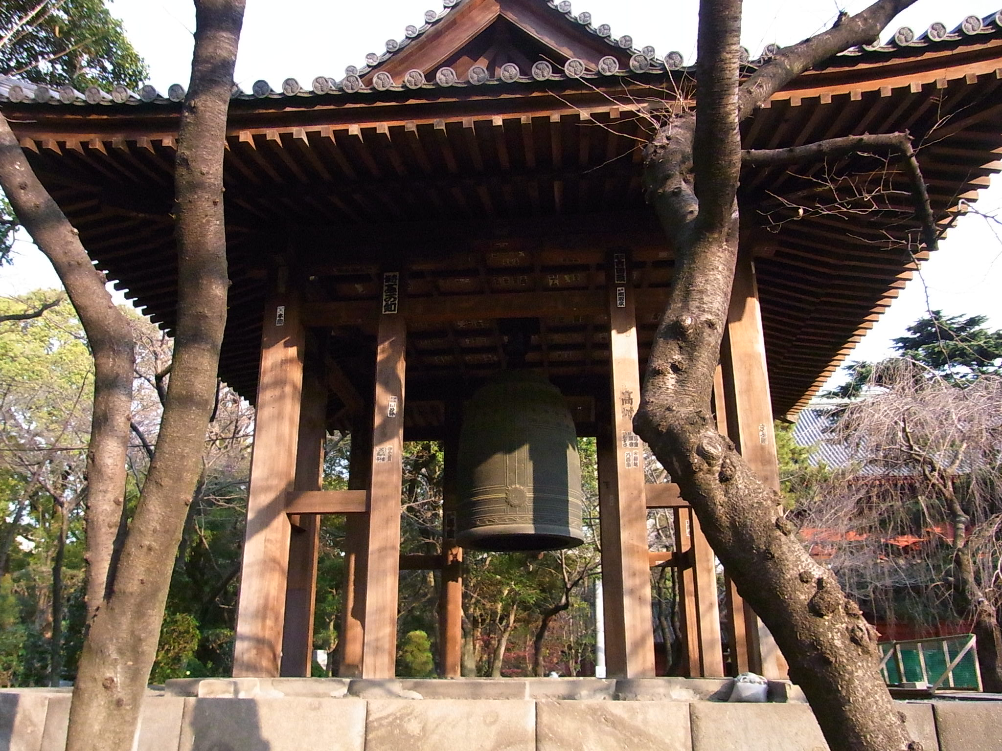 三縁山 増上寺